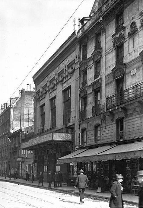 Façade du théatre de l'Alhambra : photographie de presse